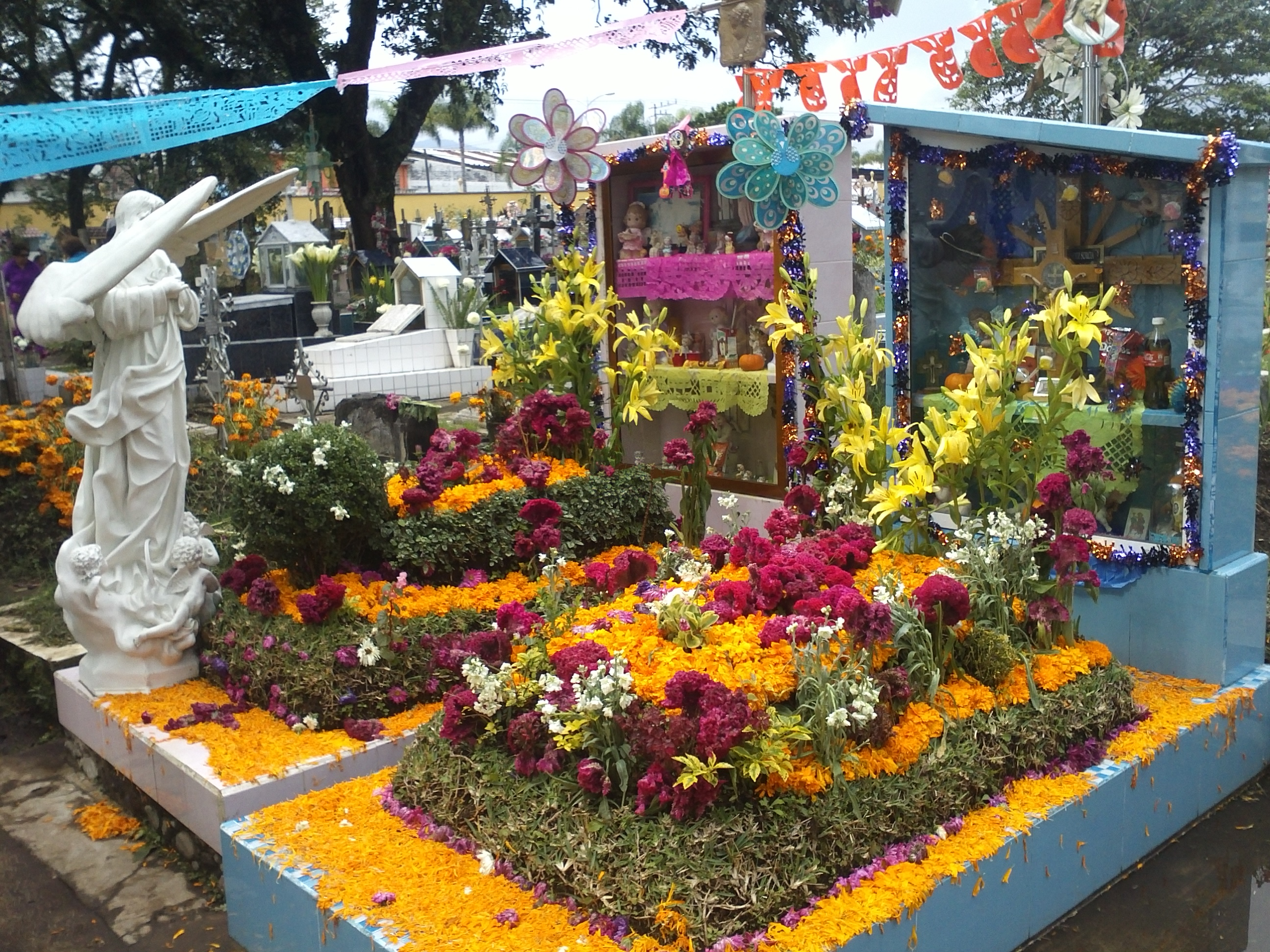 Tumba del panteón de Orizaba